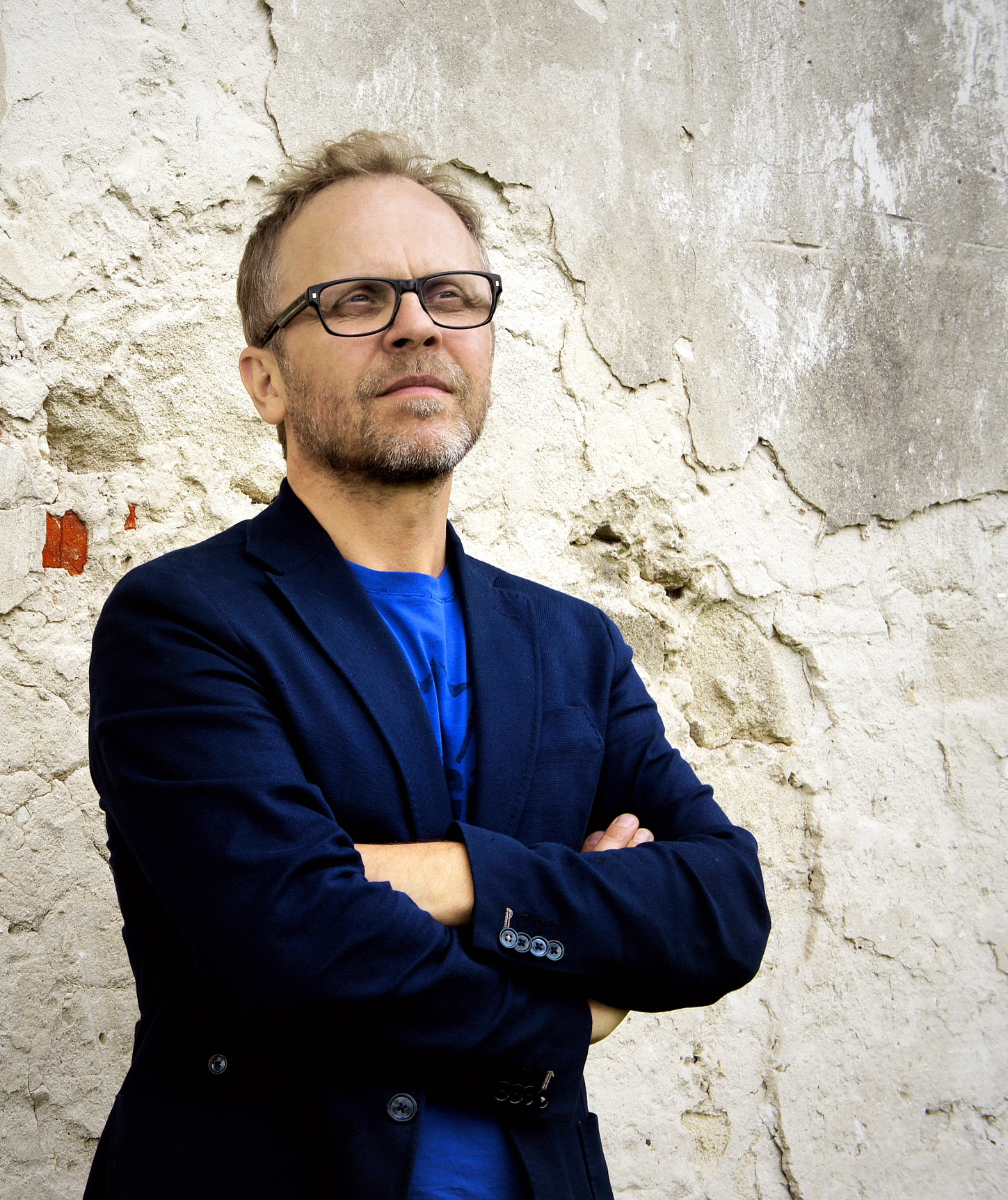 Mirosław Nizio, autor zdjęcia: Krzysztof Lipiński